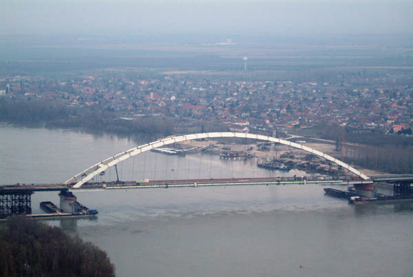 Híd - Dunaújváros - Hungary - Europe